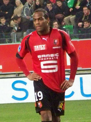 Jimmy Briand, Match de Foot Rennes - Lorient, 23 Février 2008, Ligue 1 Saison 2007-2008